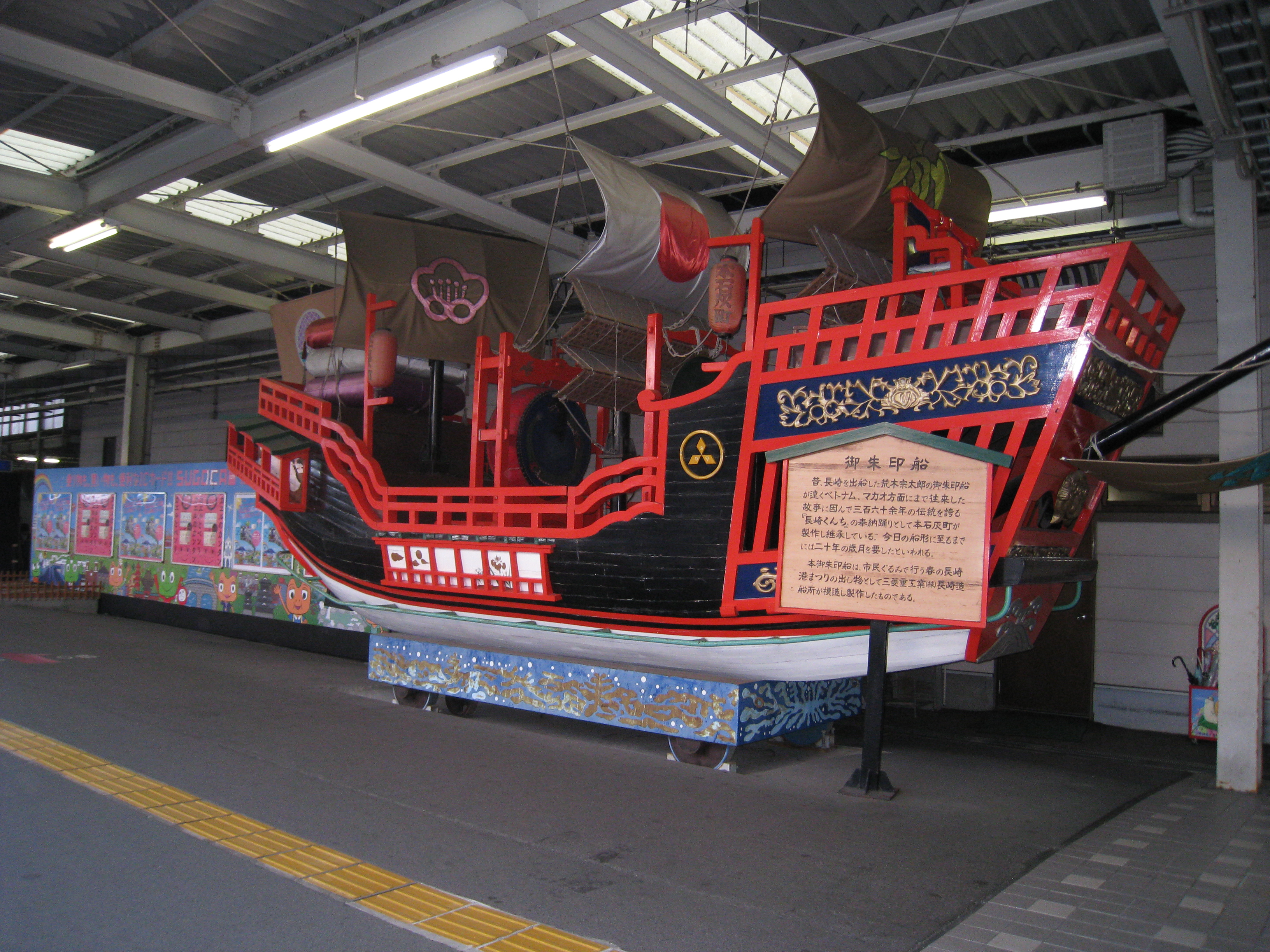 長崎駅撮影